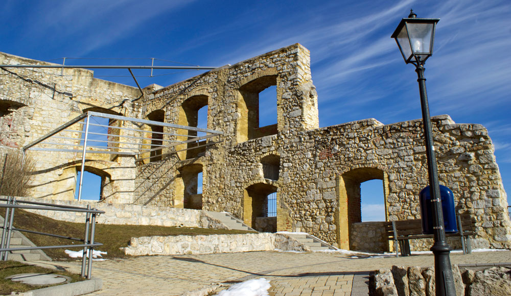 Die Burg Laaber